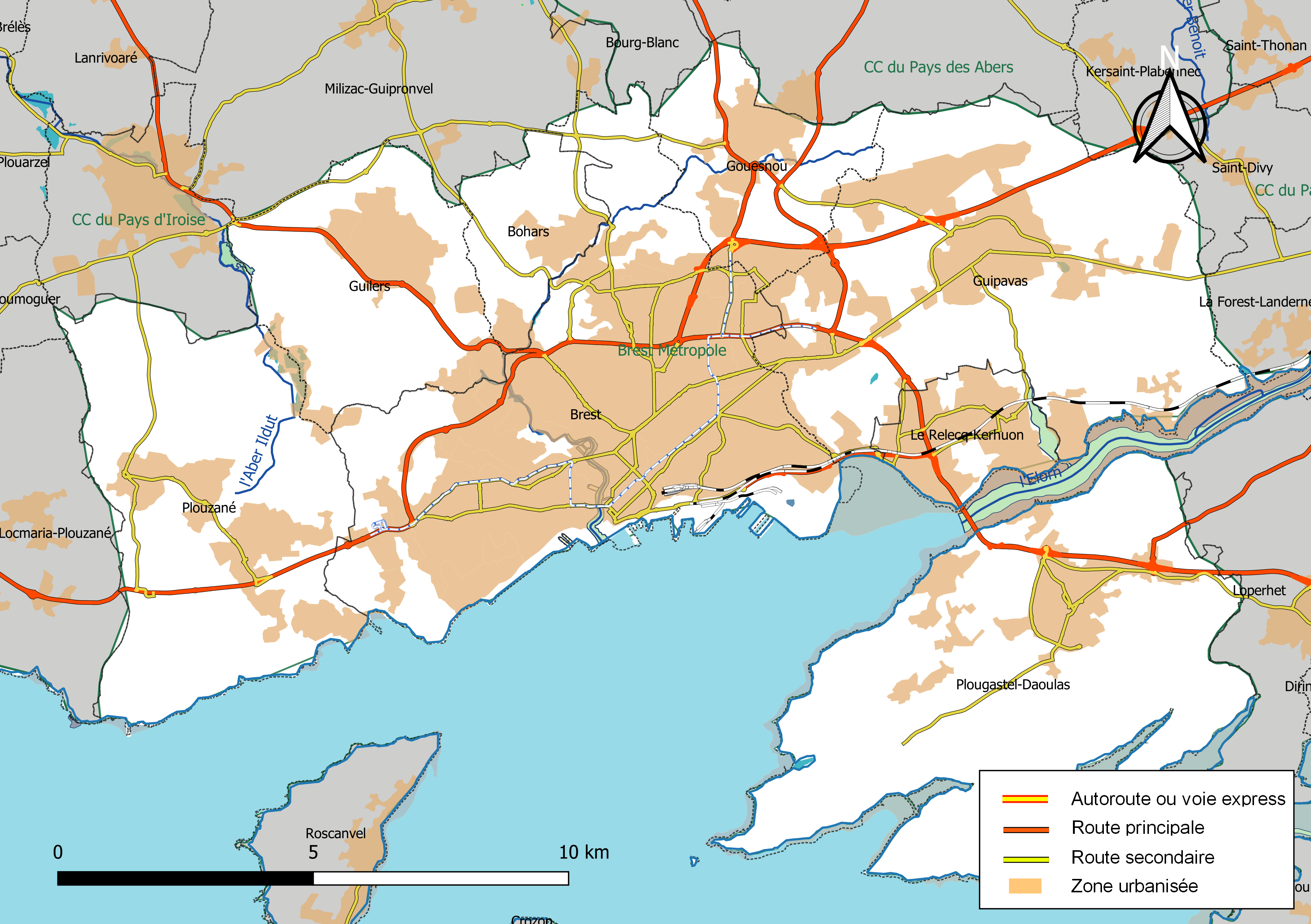 Carte géographique de l'intercommunalité Brest Métropole, département du Finistère, France. Composition au 1er janvier 2019.